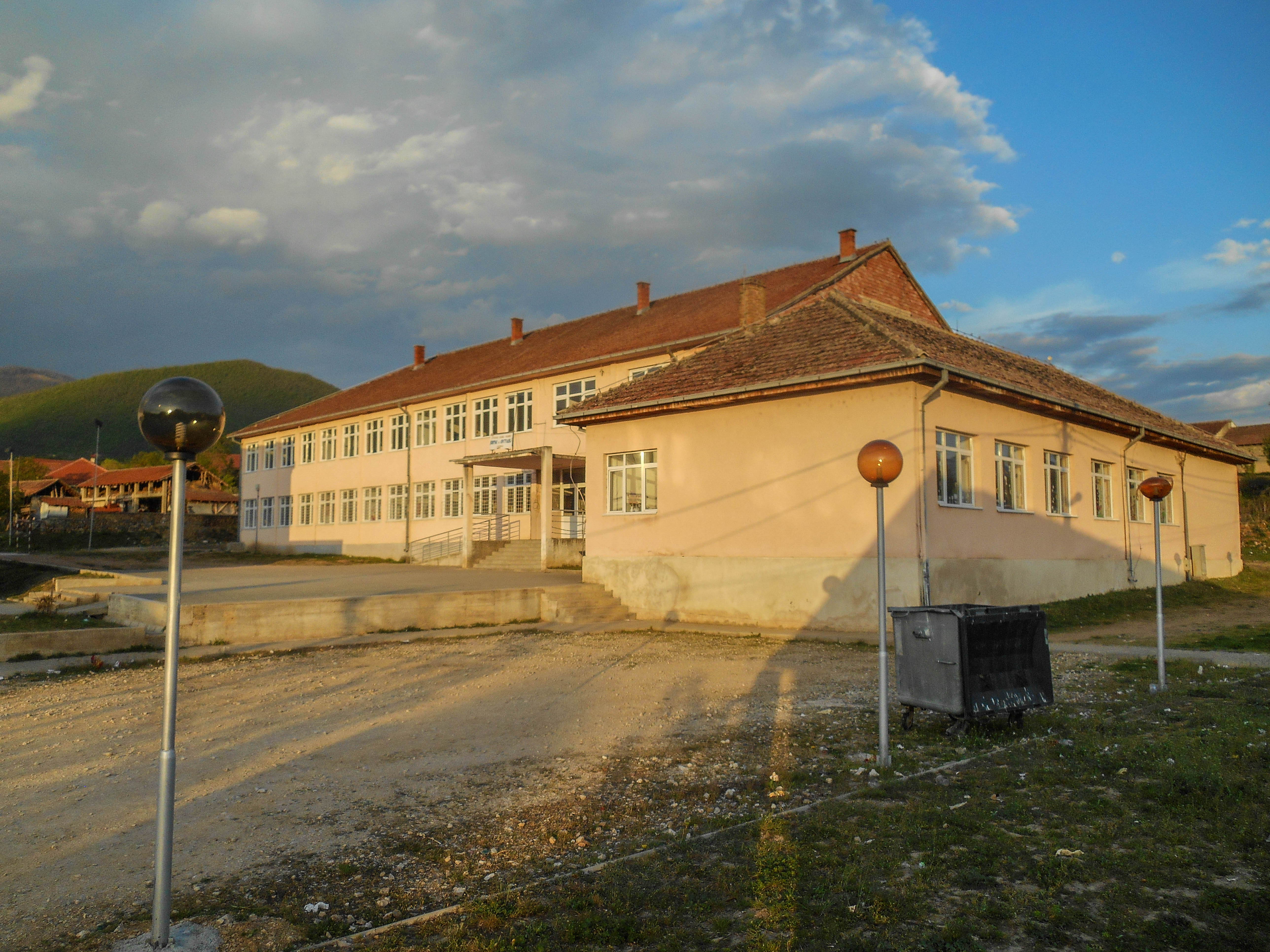 Основно училиште „Св. Кирил и Методиј“ - Иловица